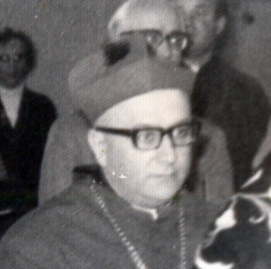 Kanovník Václav Truxa v litoměřické katedrále o letnicích 25.5.1969